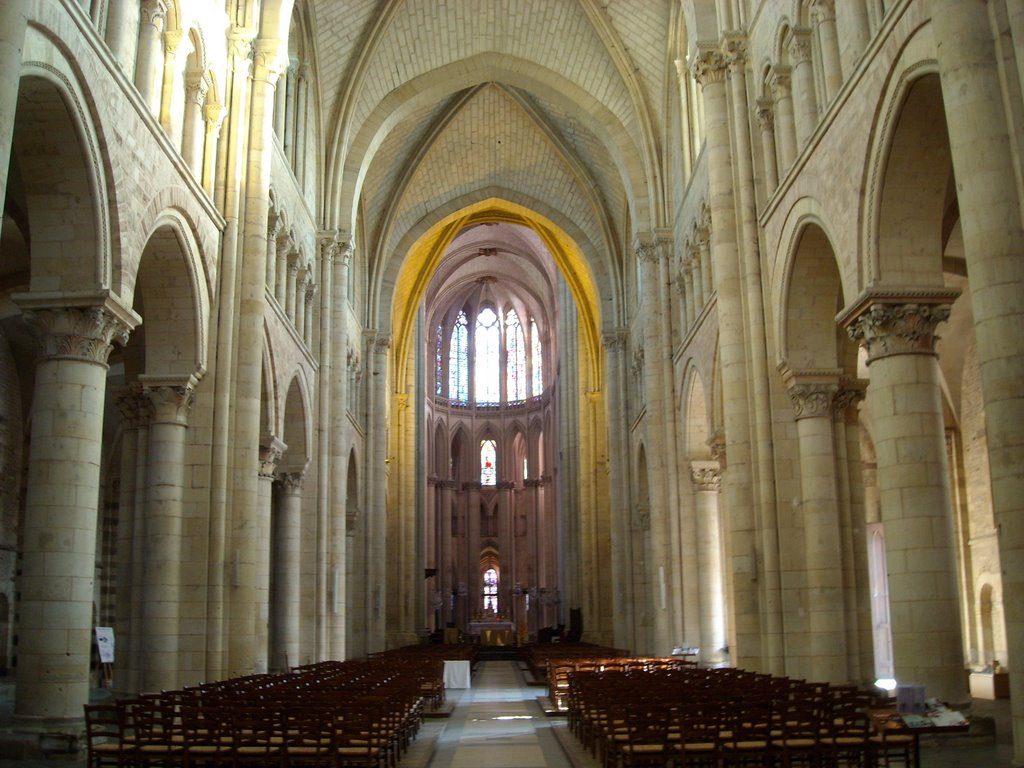 Vue de la nef romane et du choeur gothique depuis l'entrée ouest de la cathédrale